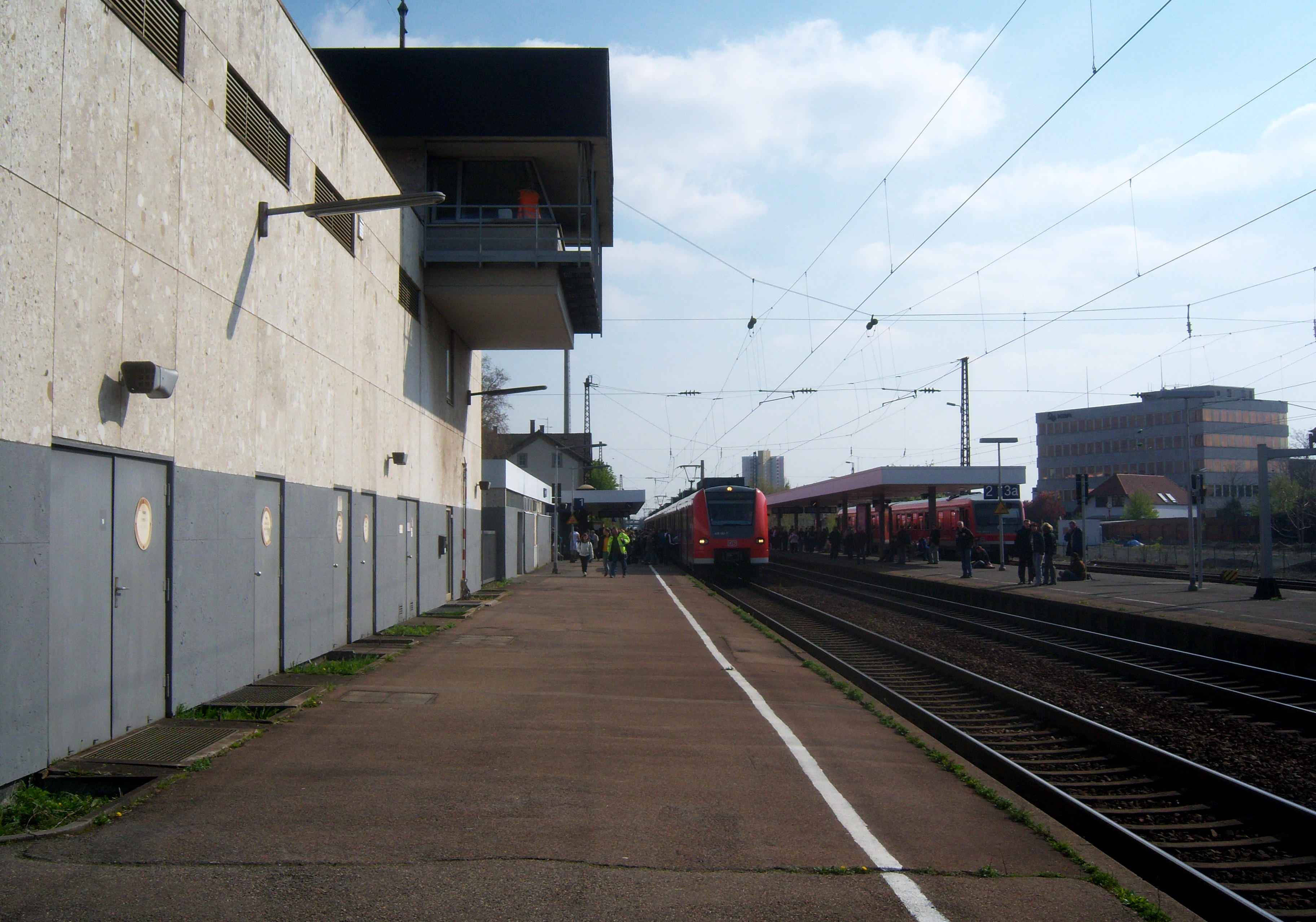 Der Frankenthaler (Pfalz) Hauptbahnhof an der Bahnstrecke Mainz–Mannheim in Rheinland-Pfalz (Deutschland)